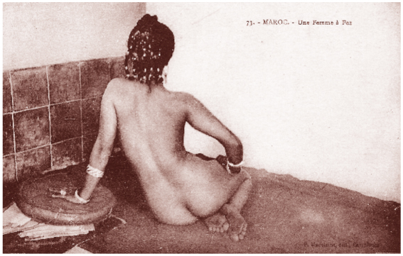 « Maroc – Une femme à Fez », Madelaine Éditeur, Casablanca n˚73, circa 1920